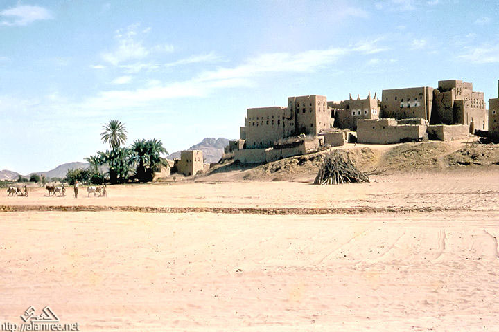 بيحان البدء بمشروع طريق النقبه 1962